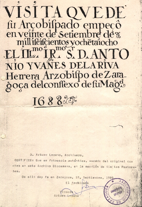 Visita del arzobispo Antonio Ibañes de la Riva Herrera al Arzobispado de Zaragoza